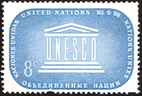 Беларуская (тарашкевіца): Марка ААН «UNESCO»